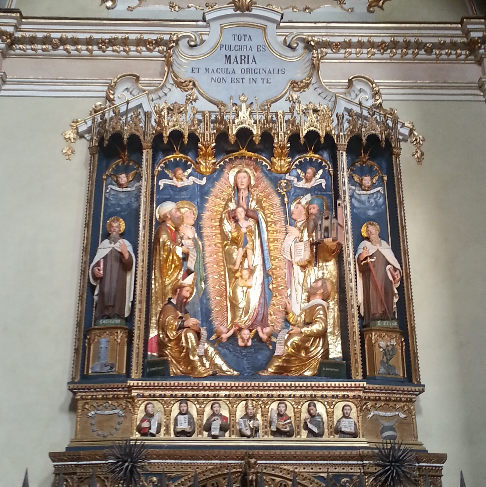 Ancona dell'Immacolata nella chiesa di Sant'Agata nel Carmine di Bergamo opera di Jacopino Scipioni